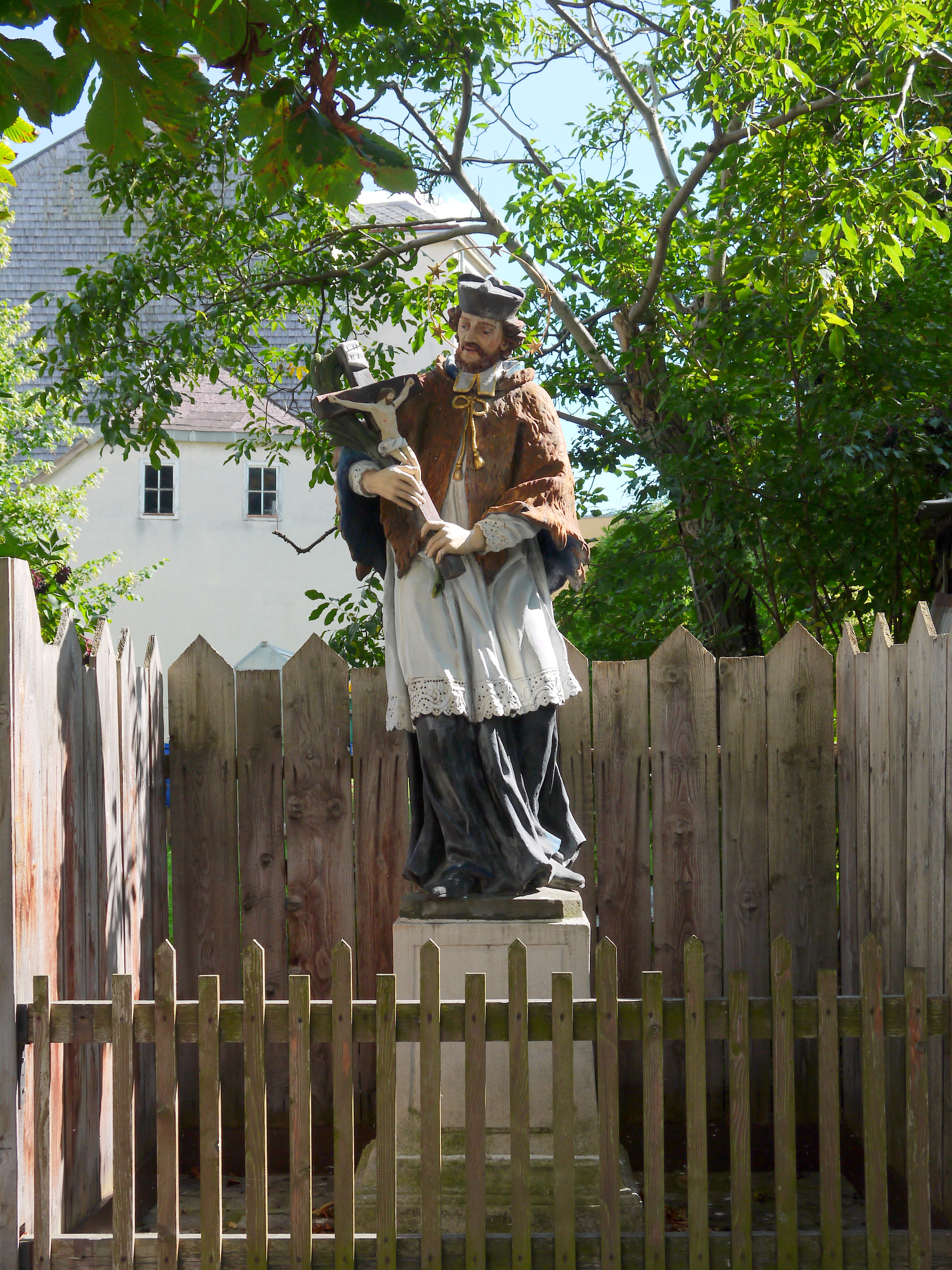 Figur hl. Nepomuk